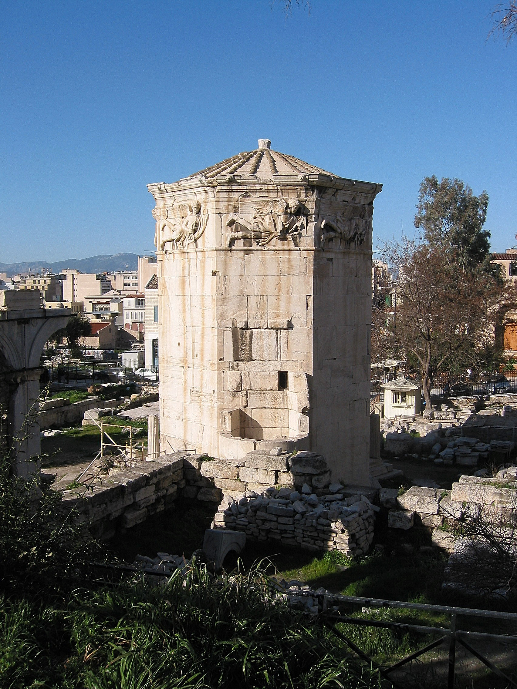 Athènes : Tour des vents. Photo prise le 29/02/2004 par Harrieta171